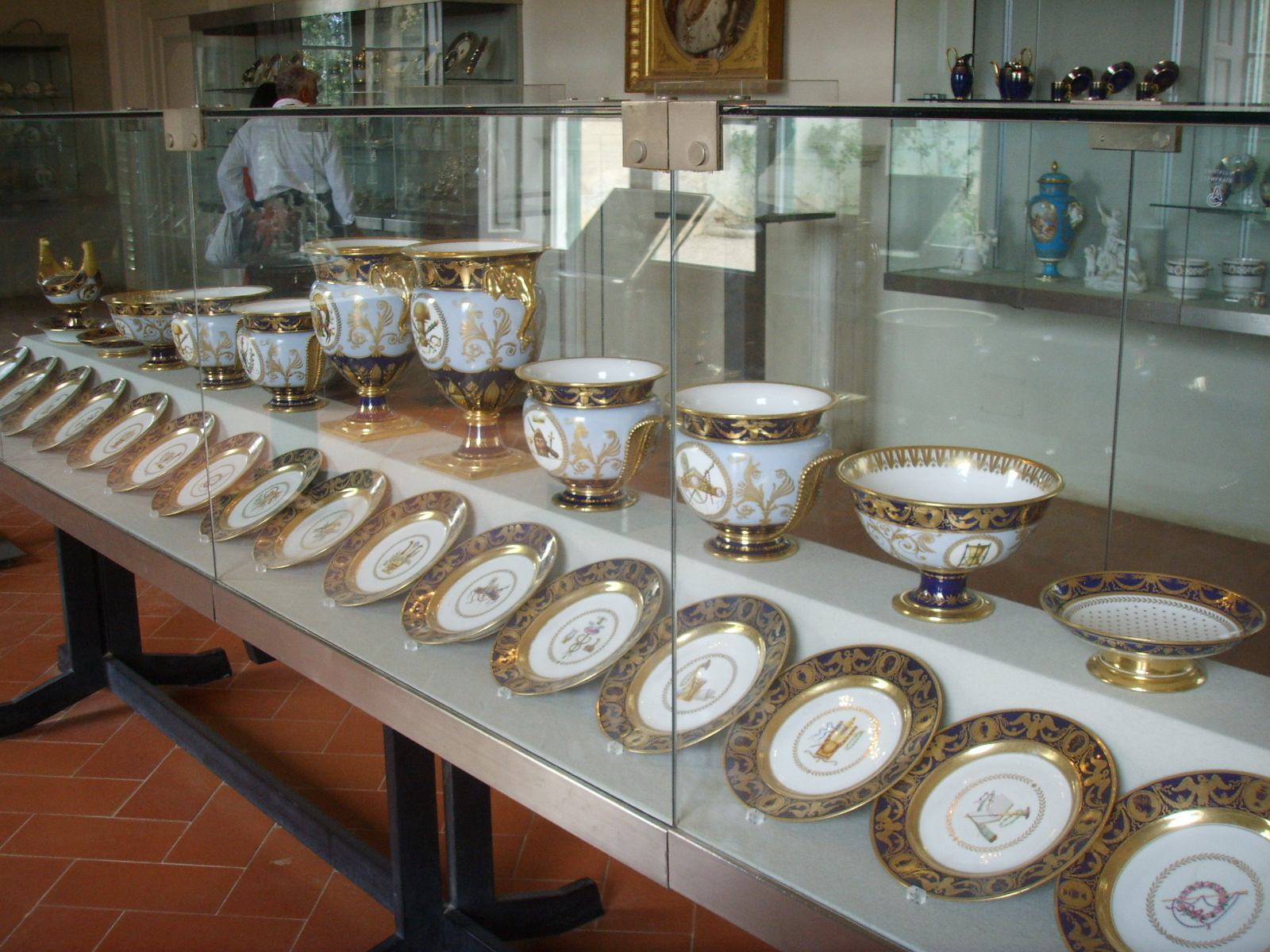 Museo delle porcellane di Firenze, servizio di elisa baciocchi, sevres, 1809-1810